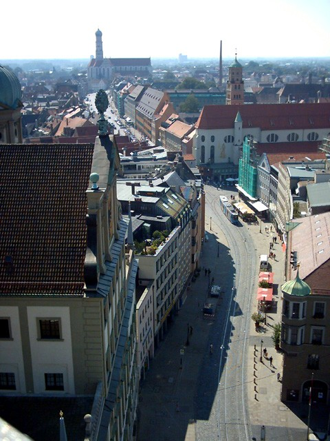 Augsburg (Bayern): Blick vom Perlachturm Richtung Maximilianstraße (links: Rathausfront)